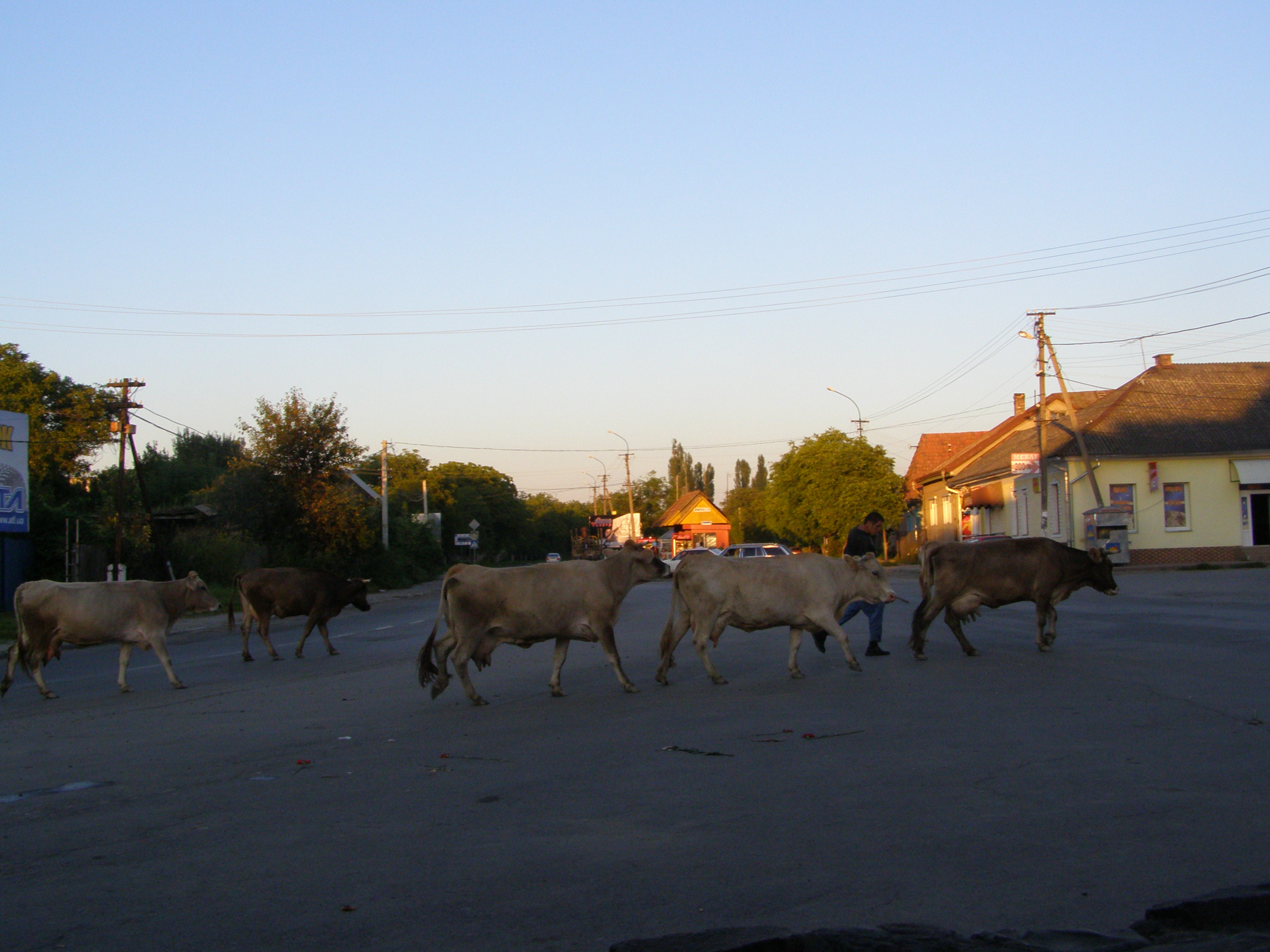 Ťačiv, krávy procházející křižovatkou ve městě